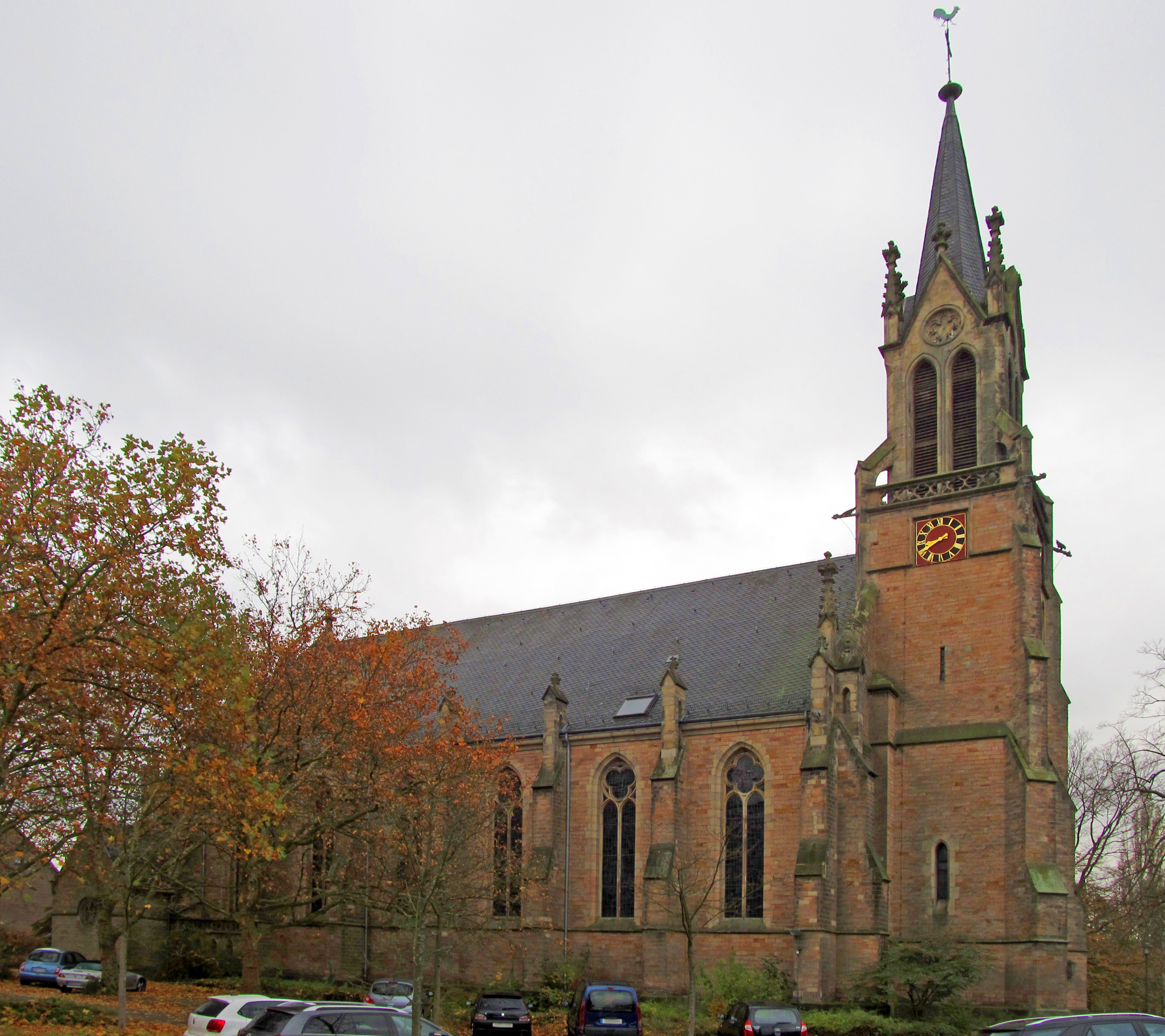 Die katholische Pfarrkirche St. Marien (Mariä Himmelfahrt) in Dudweiler, einem Stadtteil von Saarbrücken, Saarland